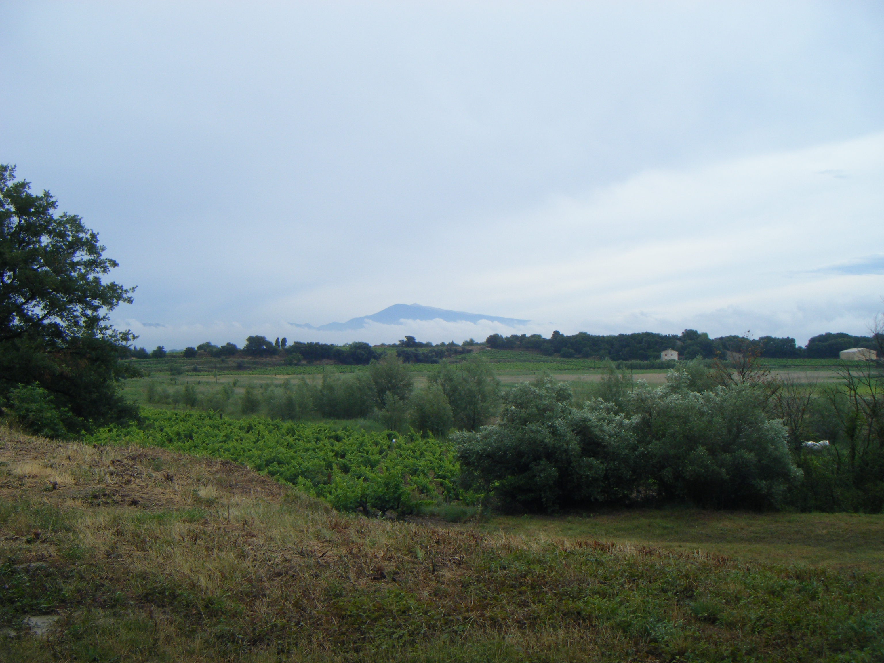 Etang salé à Courthézon avec vue sur le Mont Ventoux